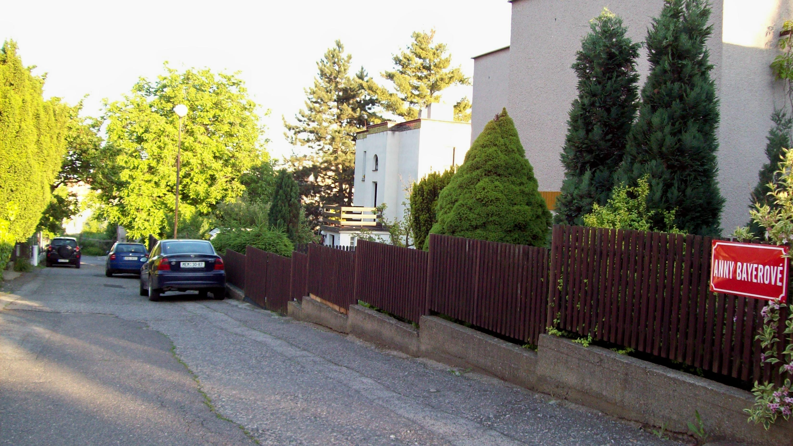 Ulice Anny Bayerová, Mělník.